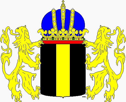 Wapen gemeente Medemblik